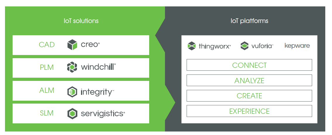 Übersicht der Produkte des Unternehmens PTC